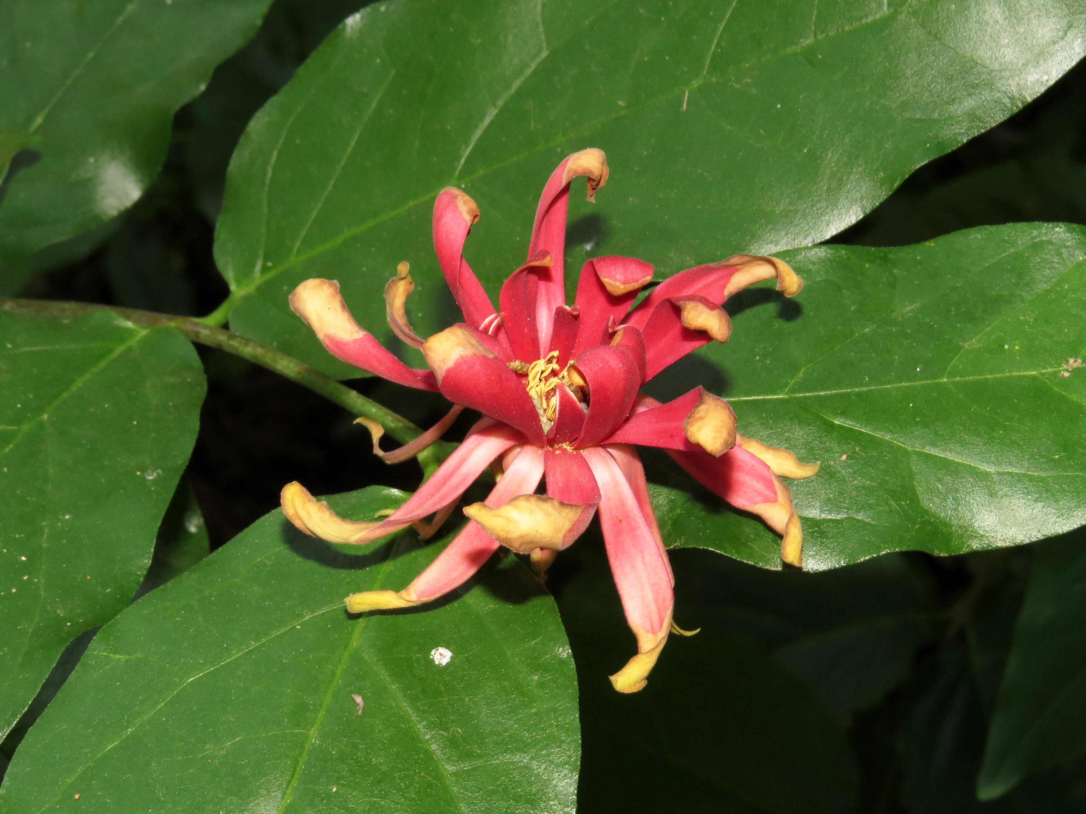 Flor de Calycanthus occidentalis. Real Jardín Botánico de Madrid. 25/06/2015.